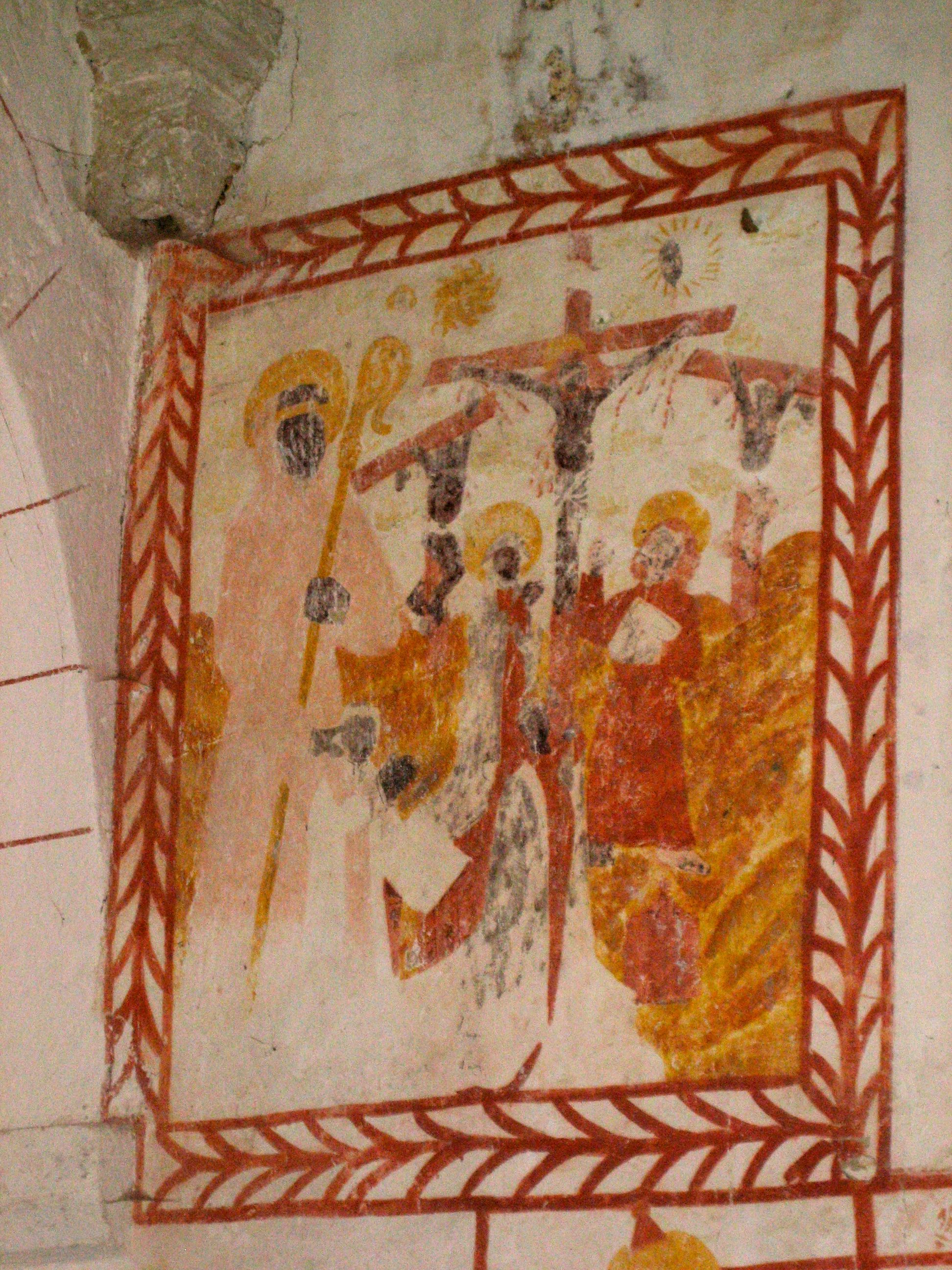 Fresque sur le mur de la nef de l'église Saint-Jeanvrin